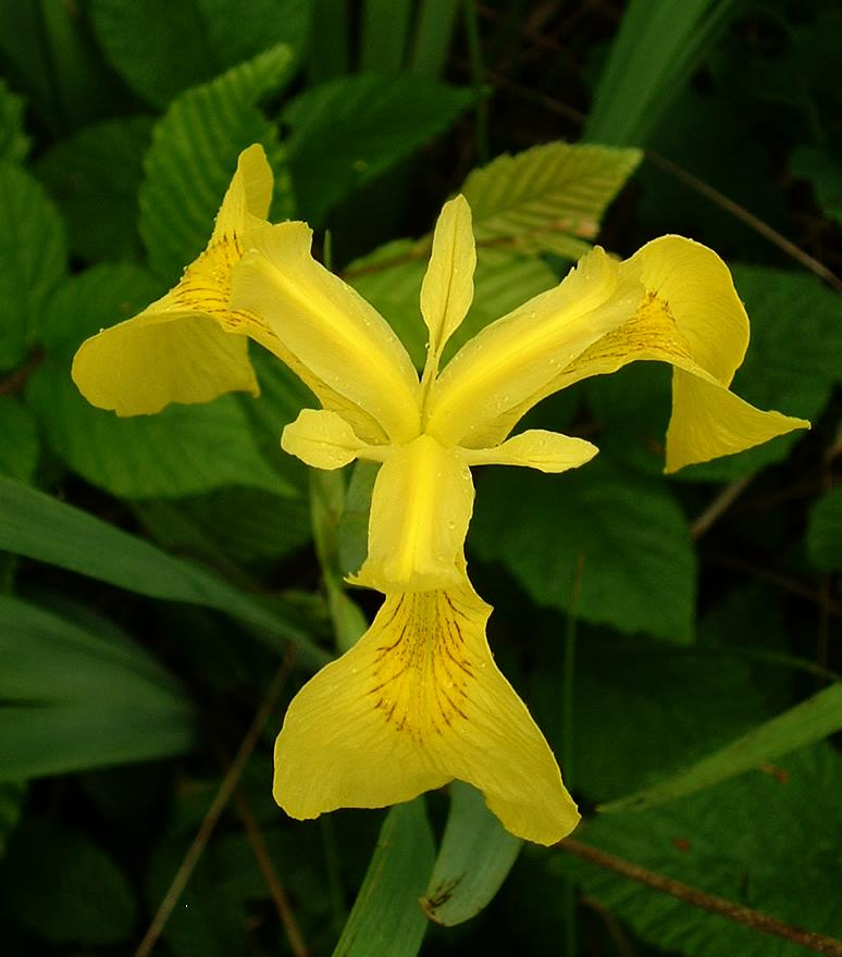 Iris d'eau, Gy